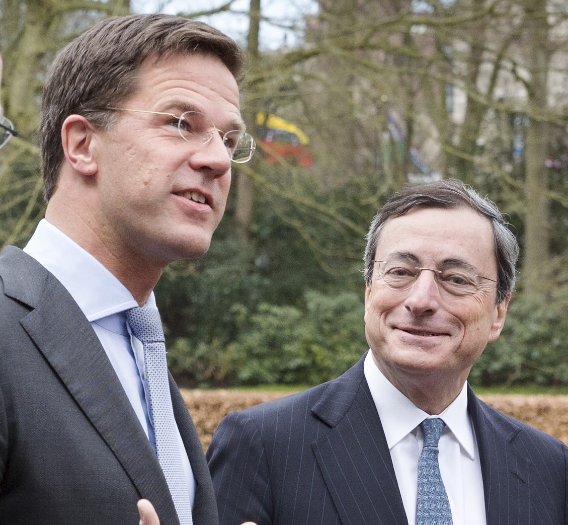 Minister-president Rutte ontvangt president Draghi van de Europese Centrale Bank op het Catshuis in Den Haag. Bij de ontmoeting waren ook minister van Financiën Dijsselbloem en DNB-president Knot aanwezig. Zij spraken onder meer over de totstandkoming van de bankenunie en het macro-economische beleid in de eurozone.